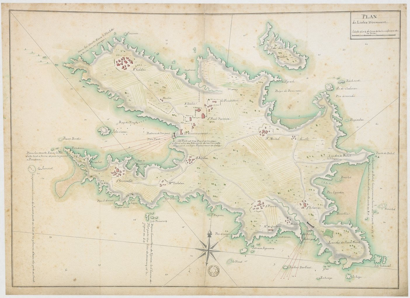 Plan de l'île d'Ouessant (1758, auteur inconnu